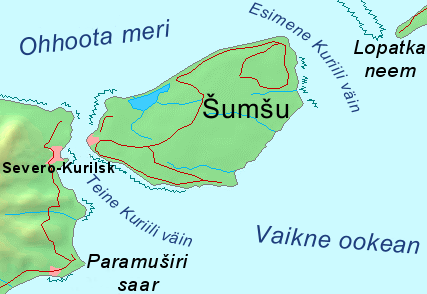 Šumšu kaart